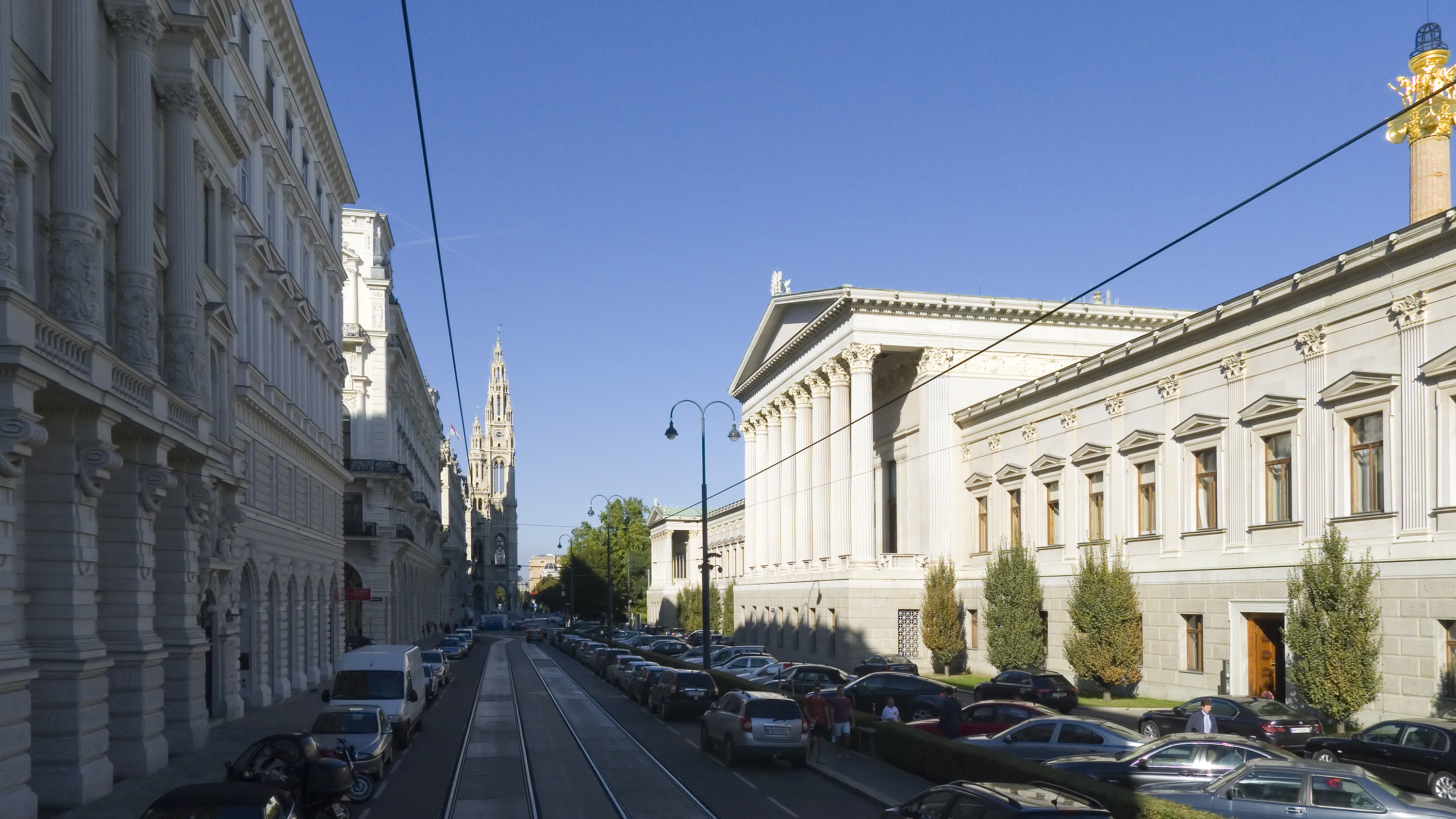 Reichsratsstraße in Wien 1 bei Nr. 1 Richtung Norden